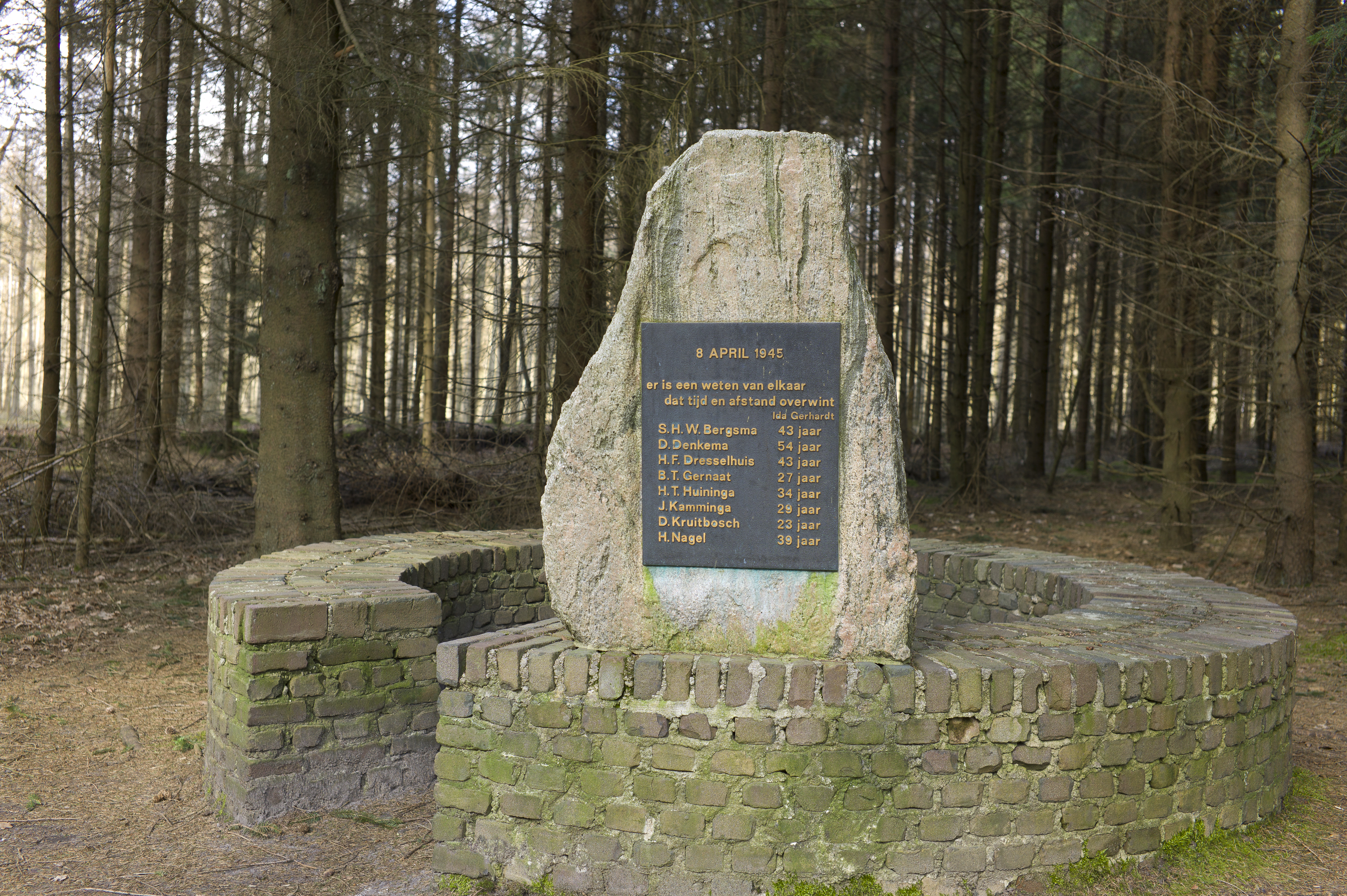 Fusillademonument, bestaande uit een lage bakstenen muur in een bijna gesloten cirkel. Op één van de hoeken van de muur is een zwerfkei is geplaatst met plaquette. De opening in de ronde bakstenen muur symboliseert het gebroken leven van de fusillade slachtoffers.